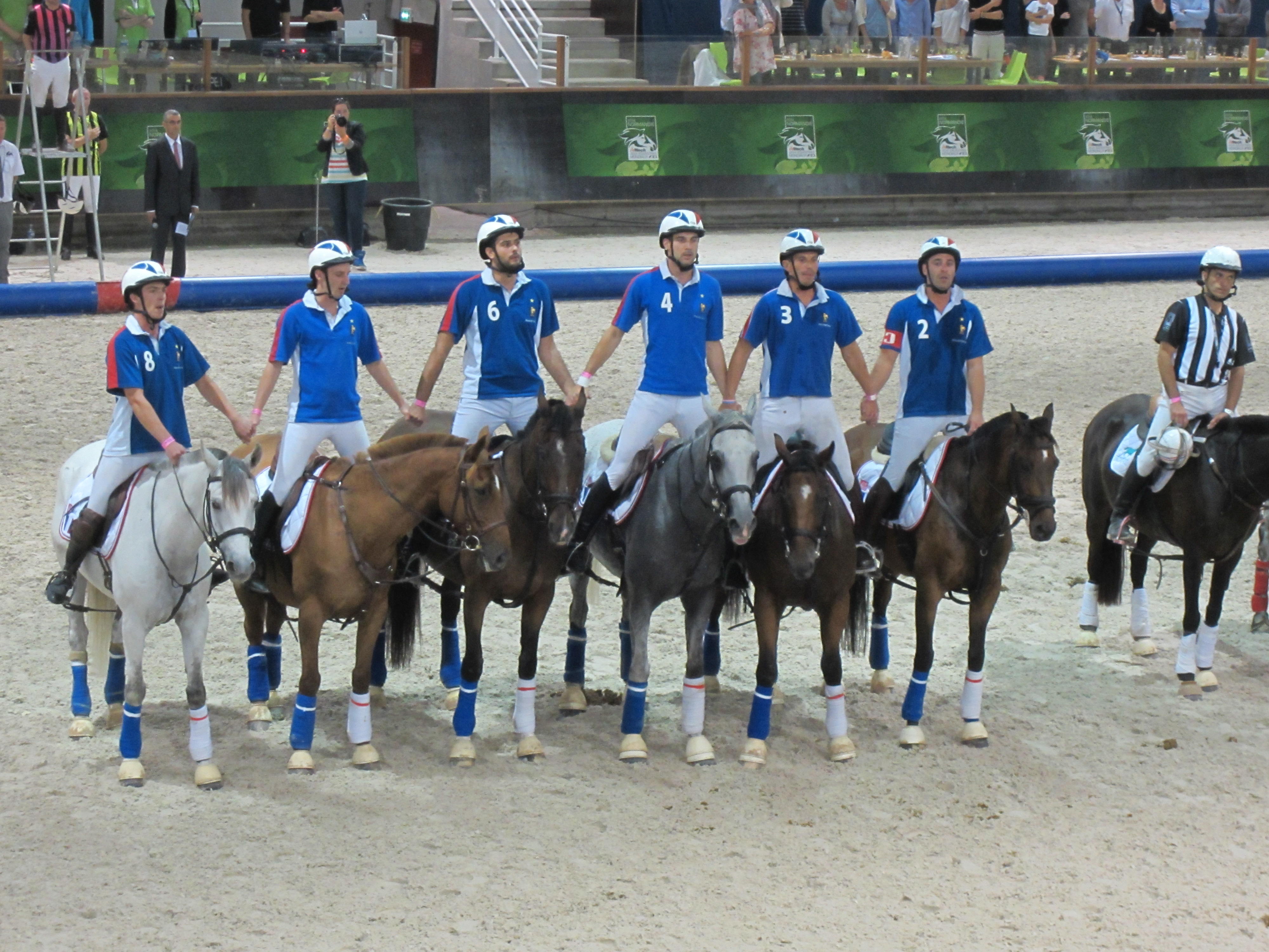 Jeux Equestres mondiaux Matche de poule France Belgique - équipe homme